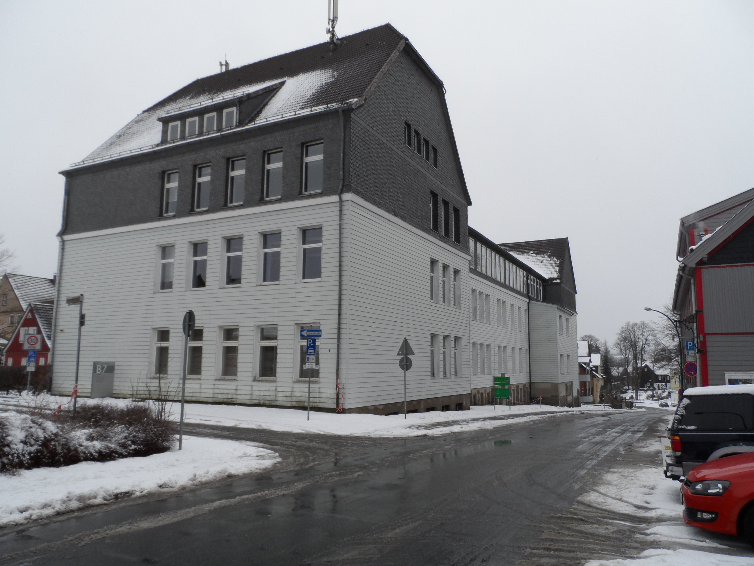 Institut für Mathematik an der TU Clausthal. 1905 - 1969 Gebäude der Robert-Koch-Schule (Clausthal-Zellerfeld)